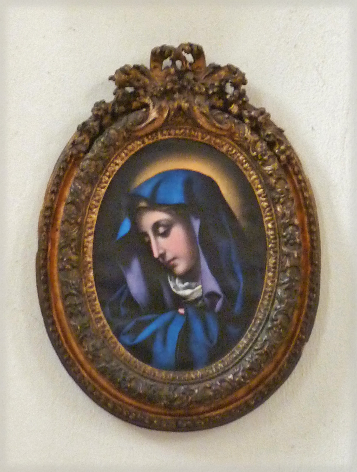 Aussiger Madonna von Ismael Mengs in der Dekanatskirche Aussig (Ústí nad Labem)